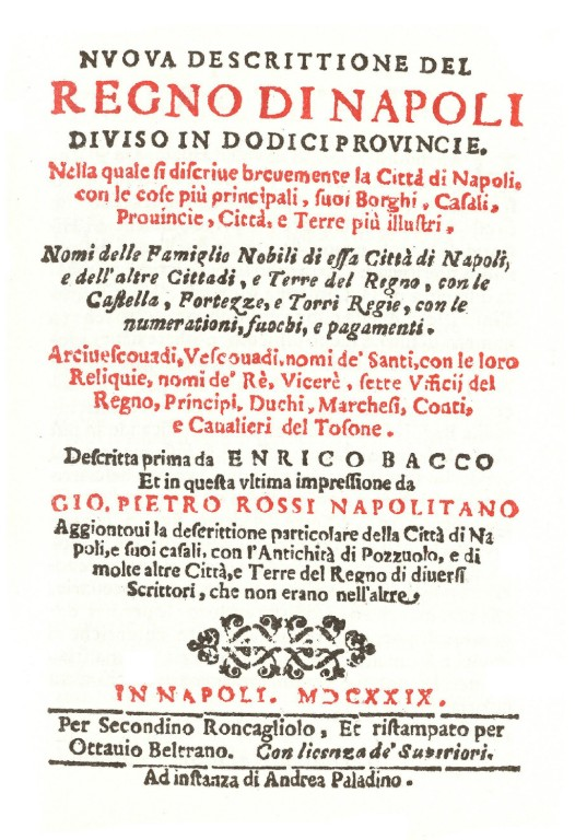 Bacco-Frontespizio Riproduzione da una ristampa anastatica Autorizzato alla pubblicazione dal detentore del copyright, via e-mail in data 08/03/2005. OGGETTO: Nuova descrittione del Regno di Napoli Concediamo l’autorizzazione alla riproduzione, in foto e con commento, della prima pagina tratta dal volume in oggetto e chiediamo che la Casa editrice Forni venga citata. Ci è gradita l’occasione per porgere cordiali saluti. ARNALDO FORNI EDITORE dott.ssa Aurelia Forni